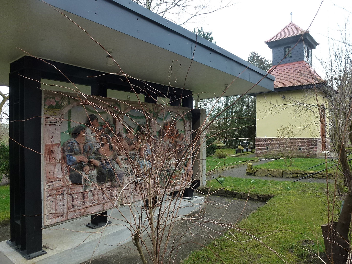 Schaddelmühle